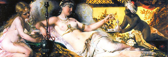 Odaliske